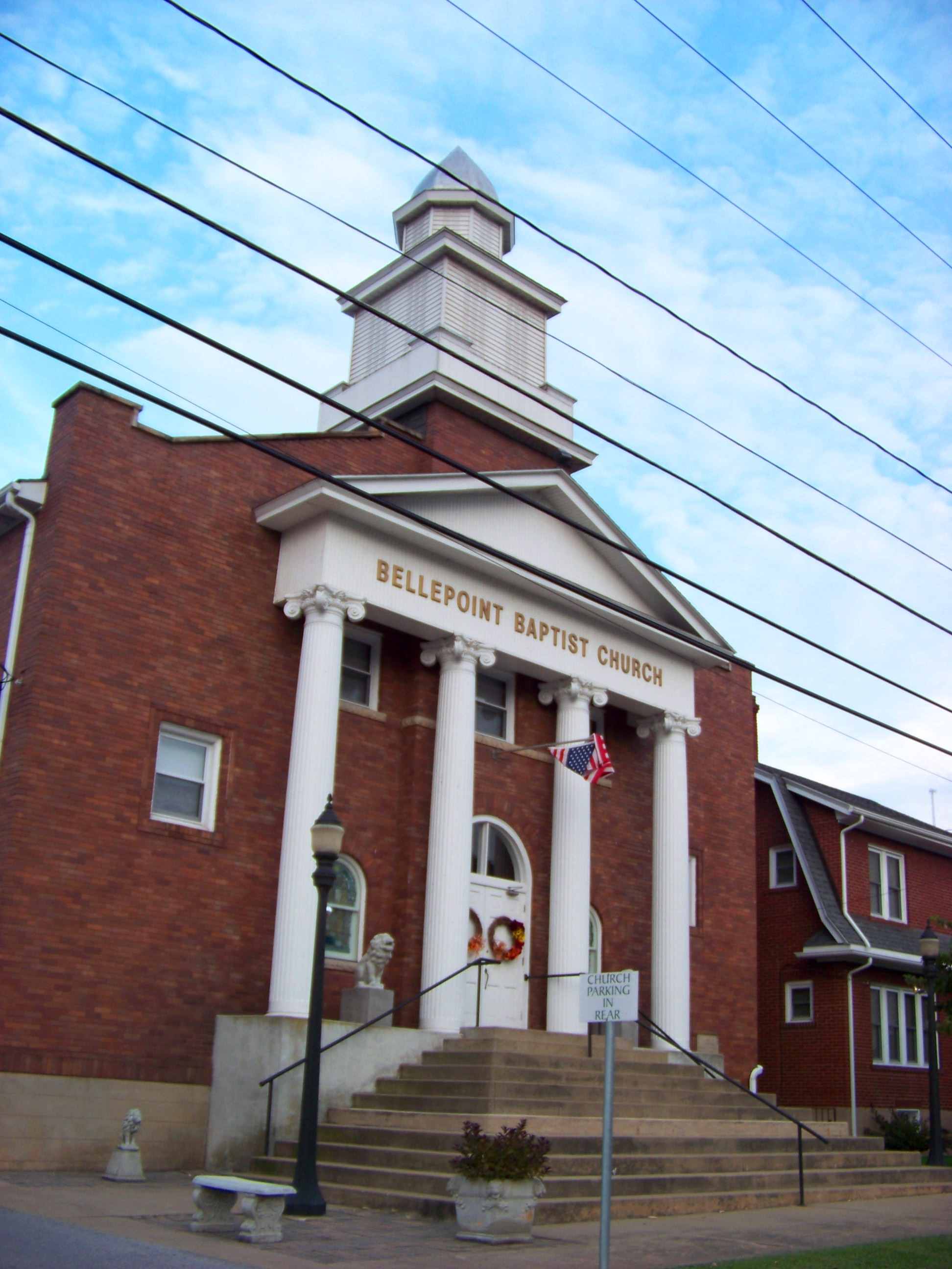 Bellepoint Baptist Church